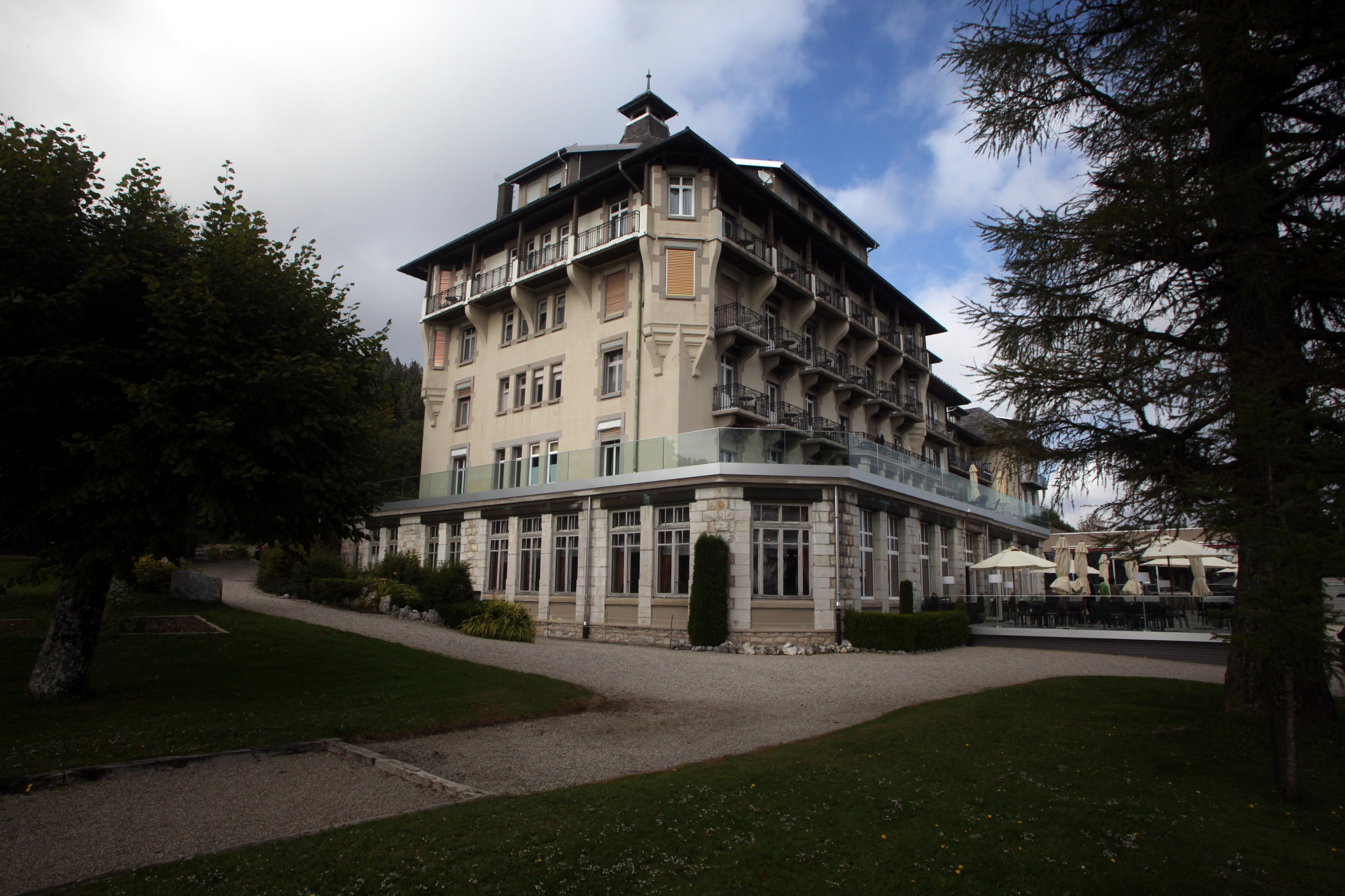 Façade ouest du Grand Hôtel des Rasses